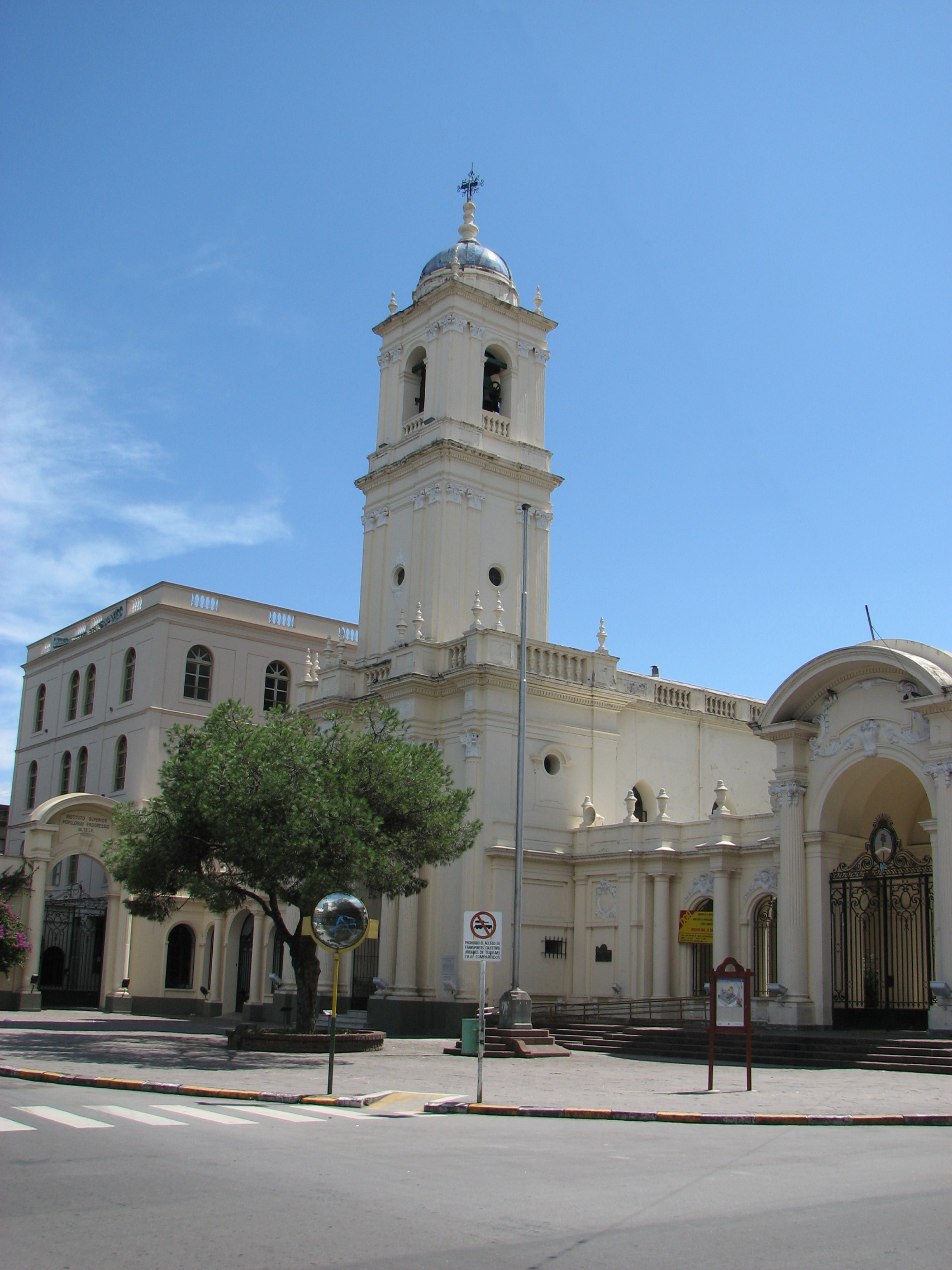 Cathédrale de San Salvador de Jujuy (Argentine)